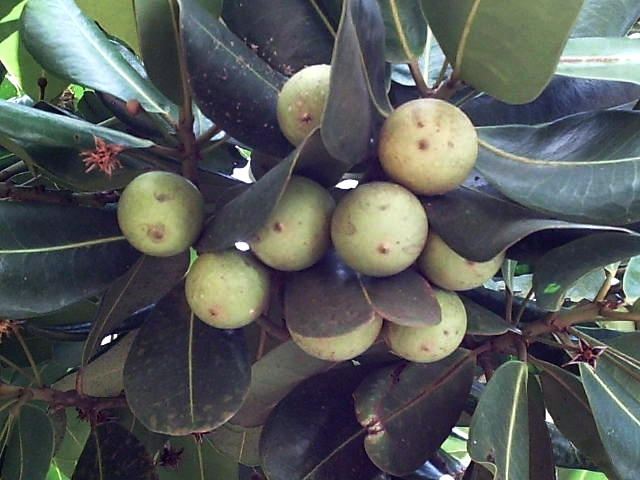 foto do fruto abricó-da-praia (Mimusops commersonii)